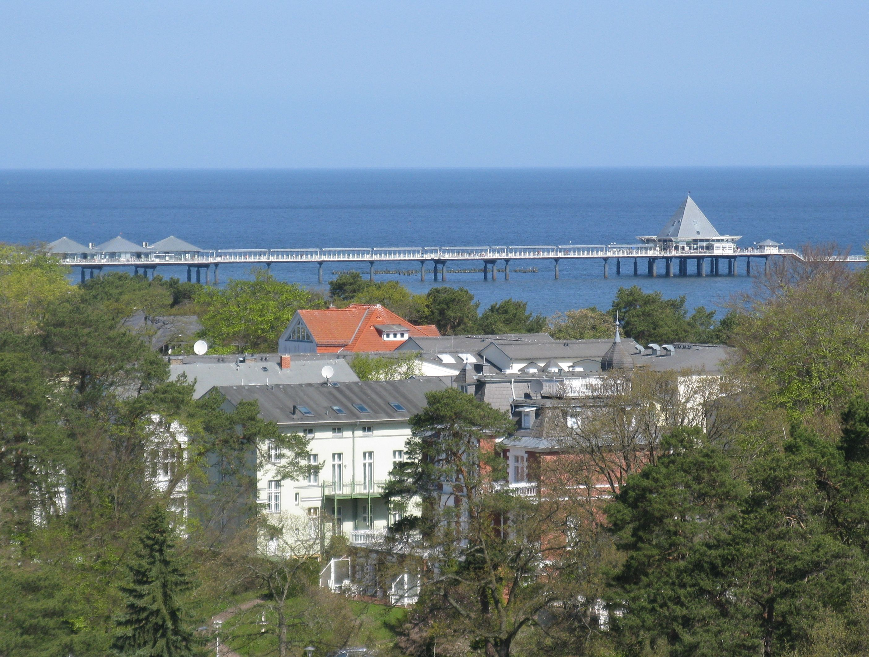 Seebrücke in Heringsdorf/Usedom, vom Aussichtsturm der Ostseetherme in Albeck aus gesehen